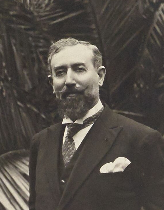 Jules Brévié à la 7e conférence Nord-Africaine à Tunis (détail)